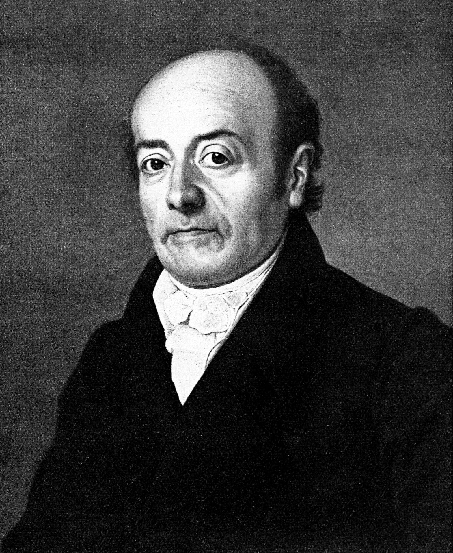 Enterpreneur in Magdeburg (Germany)